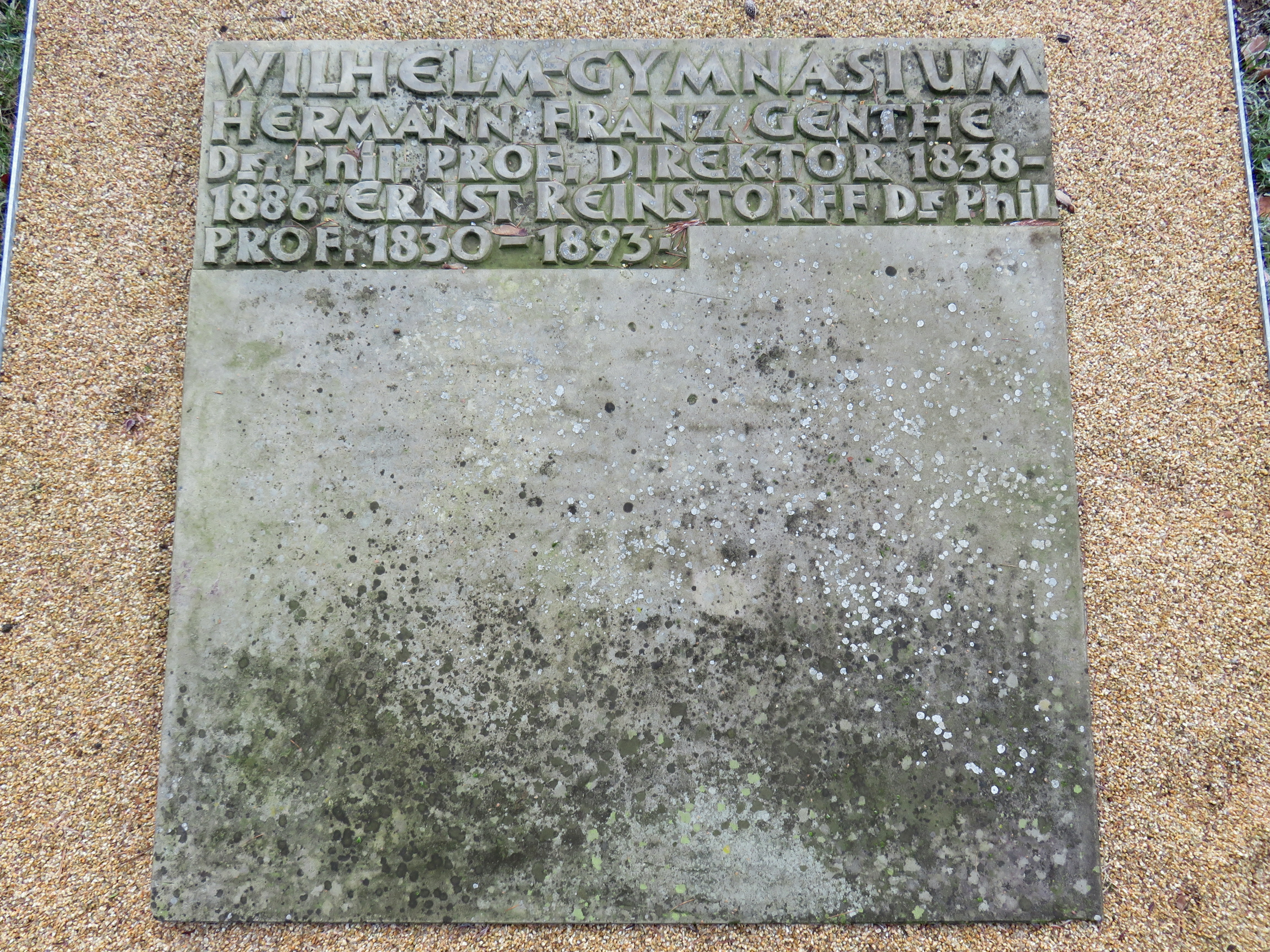 Sammelgrab Wilhelm-Gymnasium im Bereich des Althamburgischen Gedächtnisfriedhofs auf dem Hamburger Friedhof Ohlsdorf zu Ehren von unter anderem Hermann Genthe.